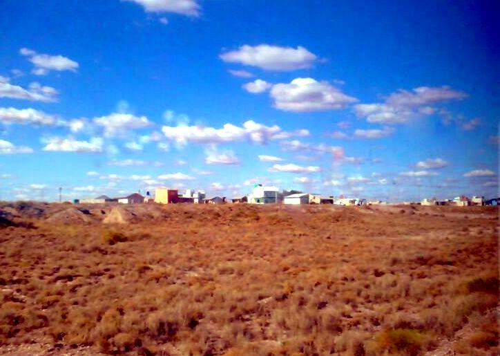 Vista panorámica del insipiente pueblo del balneario de Las Conchillas